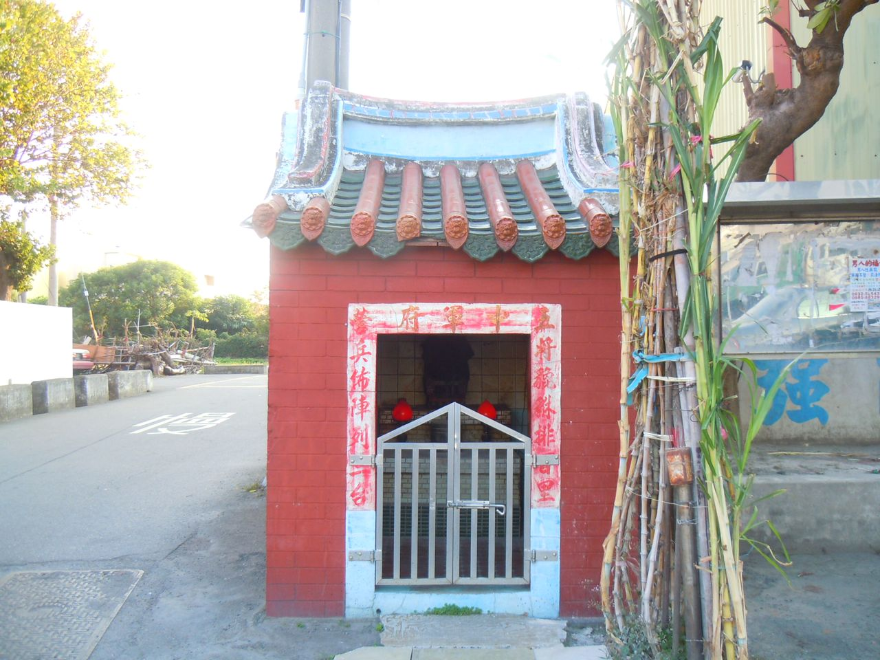 中文（台灣）: 彰化縣和美鎮嘉犁里東坡路17巷臨10號－嘉犁嘉安宮。